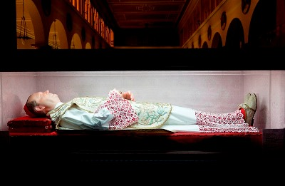 Guido Maria Conforti Casa Madre, sepolcro